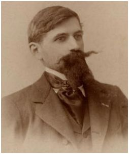 Tristan Klingsor (1874-1966)